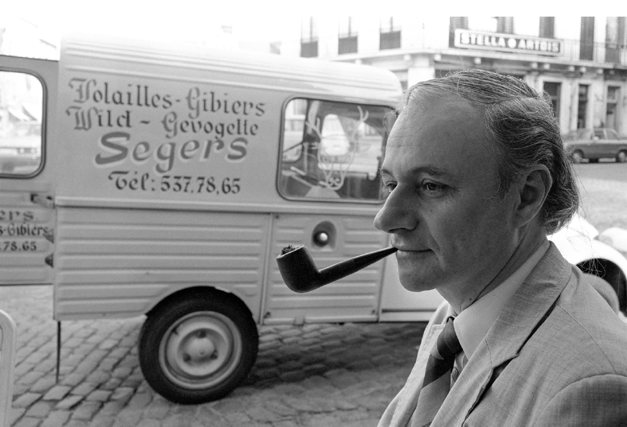 Jacques Calonne in 1978 at Place du Grand Sablon, Bruxelles.